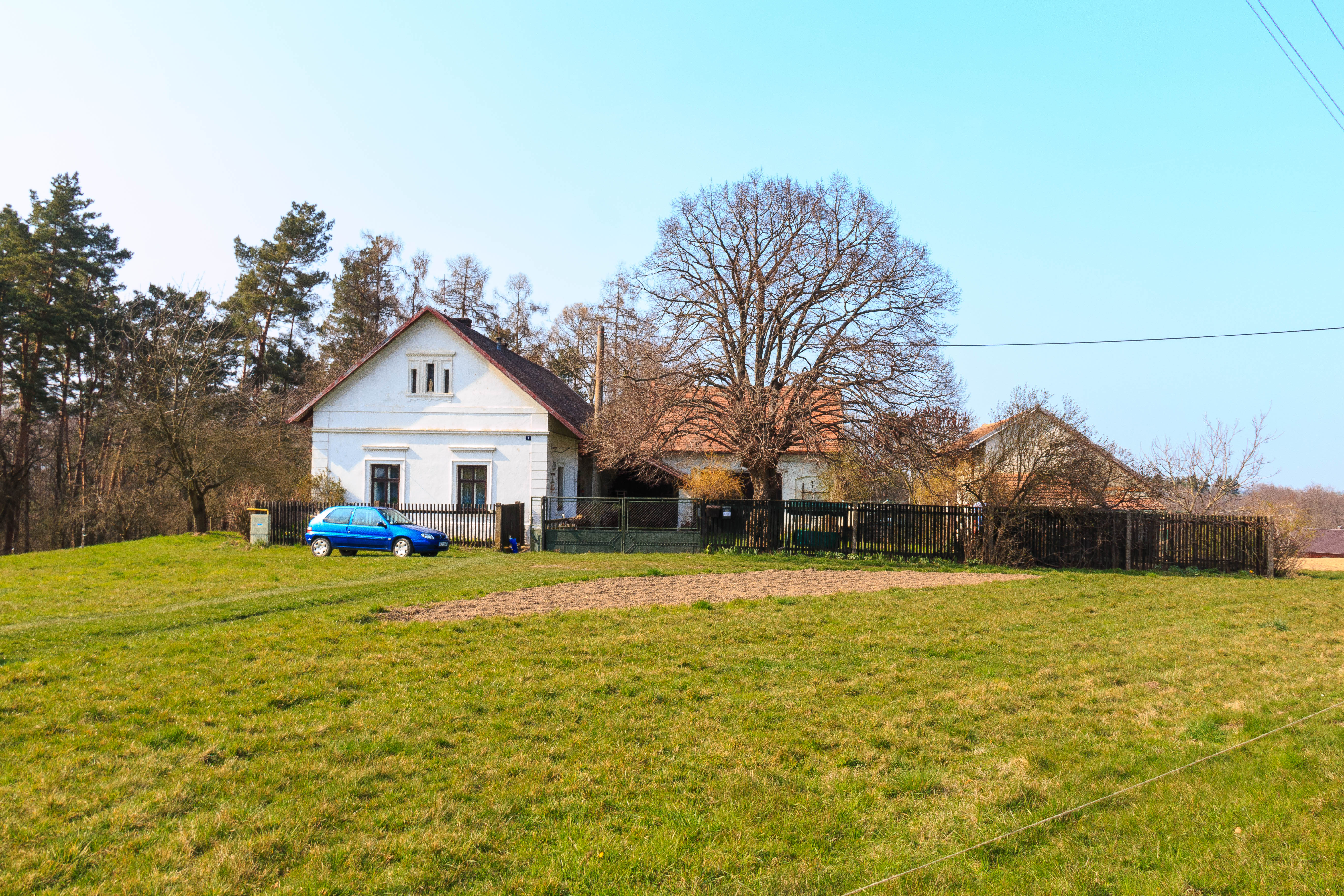 Bítovánky čp. 1